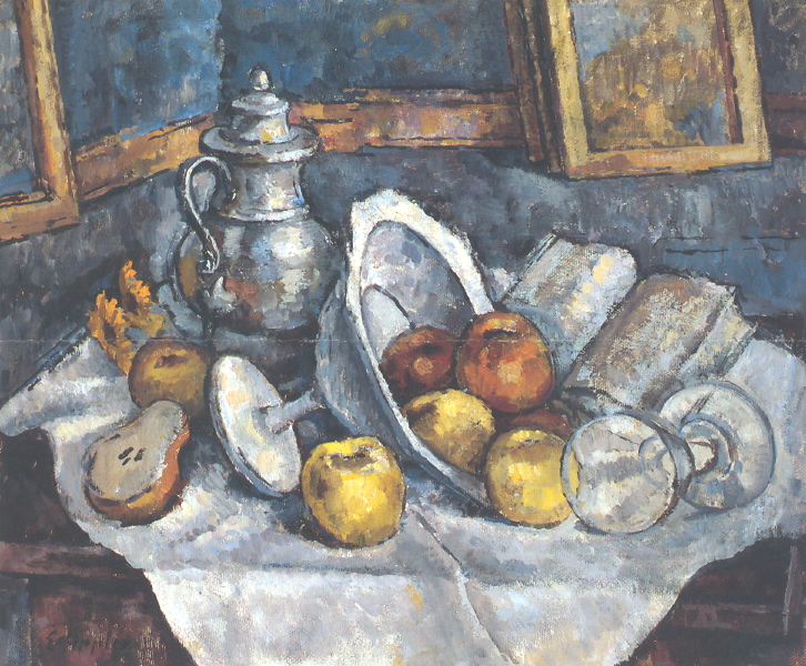 In den Jahren 1908 bis 1910 malte Ernst Oppler einen Zyklus von Stillleben